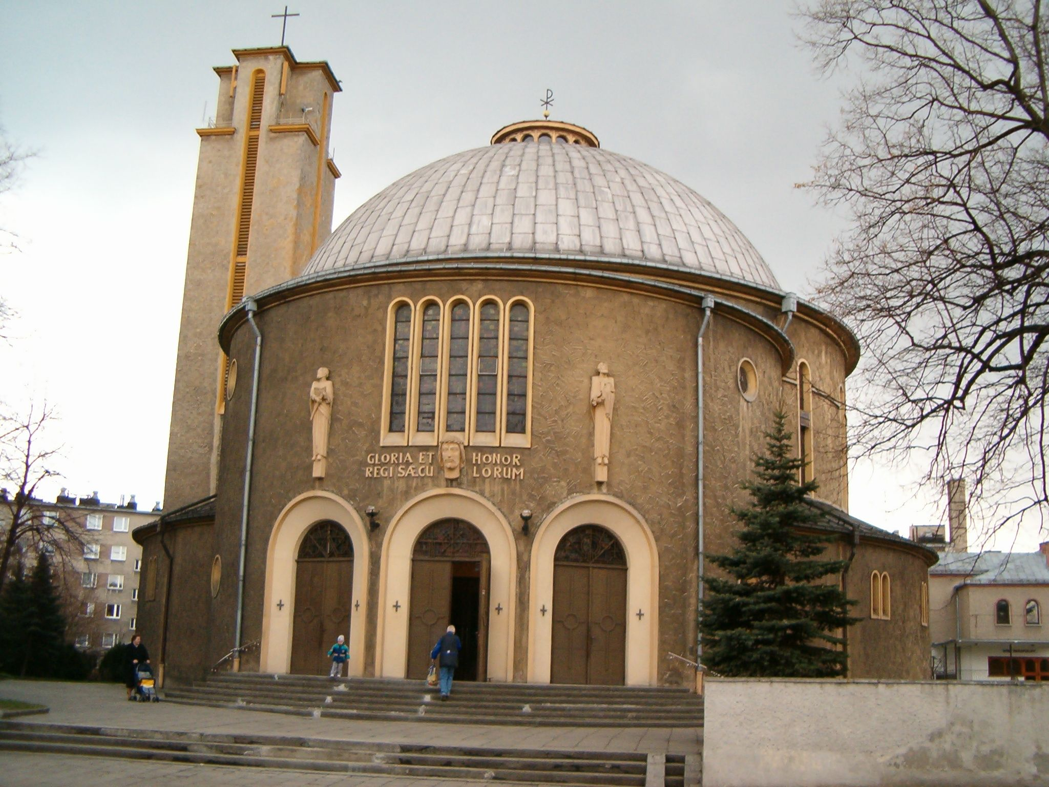 Parafia NSPJ w RAciborz